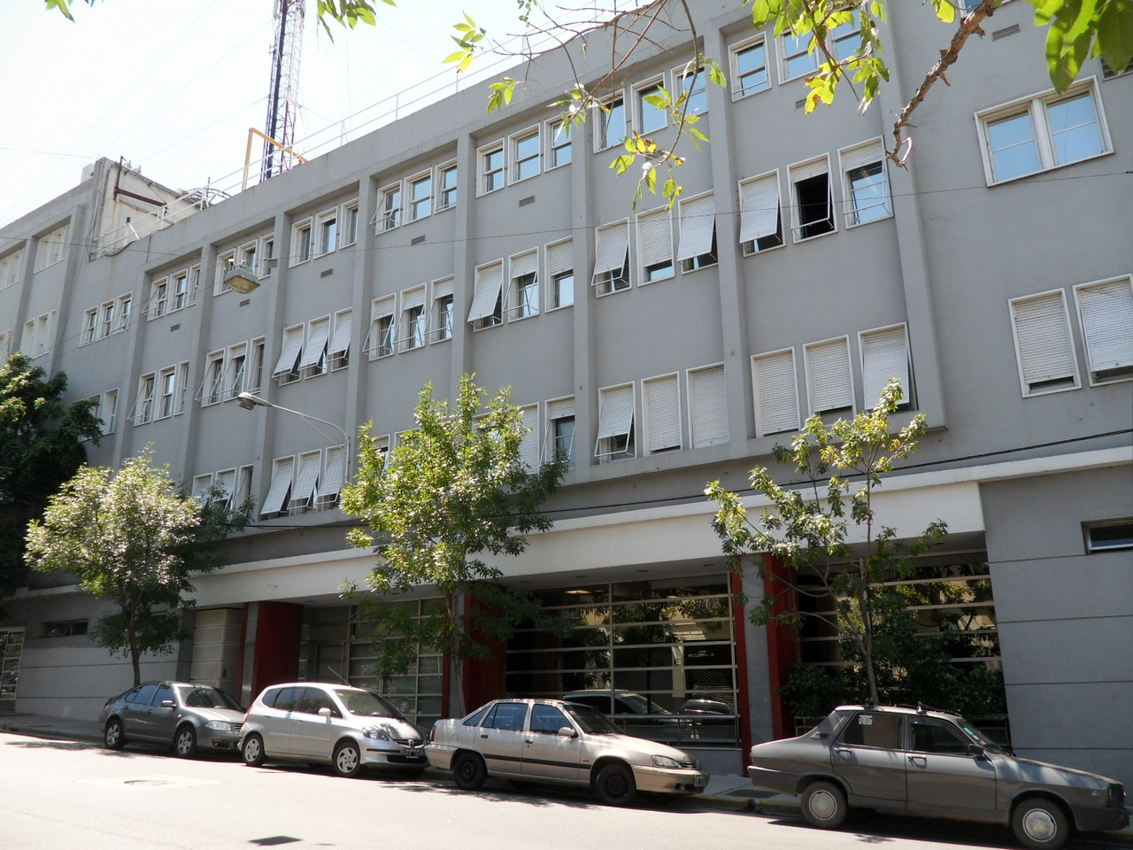 Vista desde la calle Tacuarí